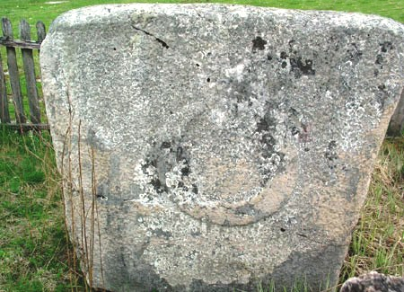 Stećak u selu Donje Baljvine